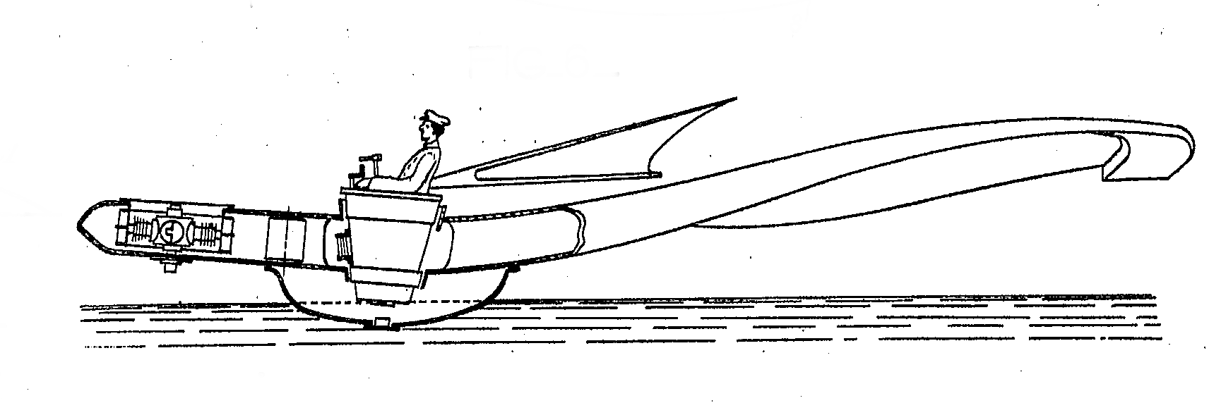 Monocopter